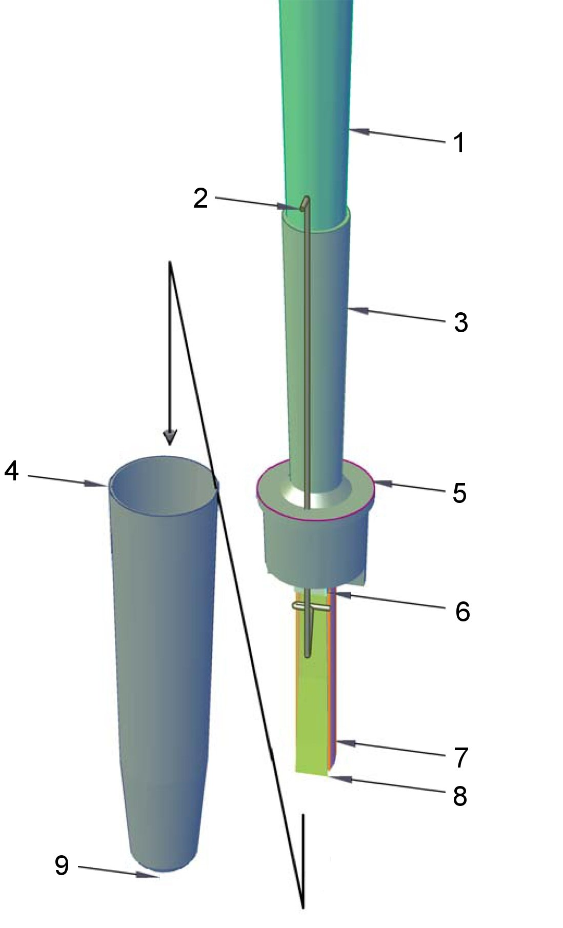 リード管構造図(Trompete)、部位名称、自作画像 from jawp